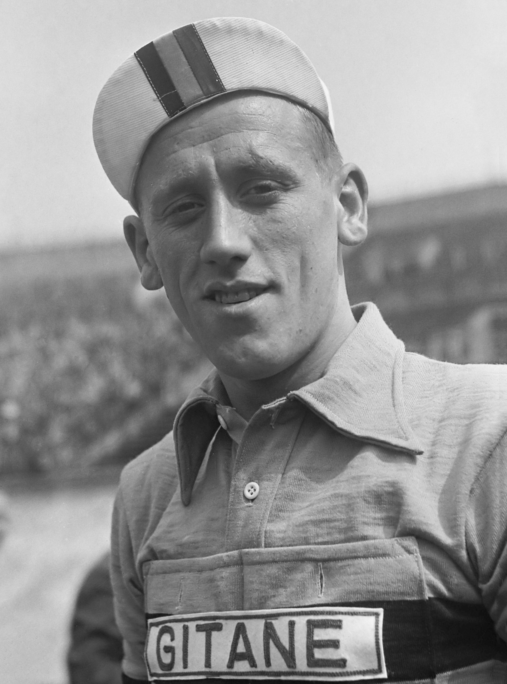 Koppen deelnemers Tour de France , Brankart (Belgie) 12 juli 1954